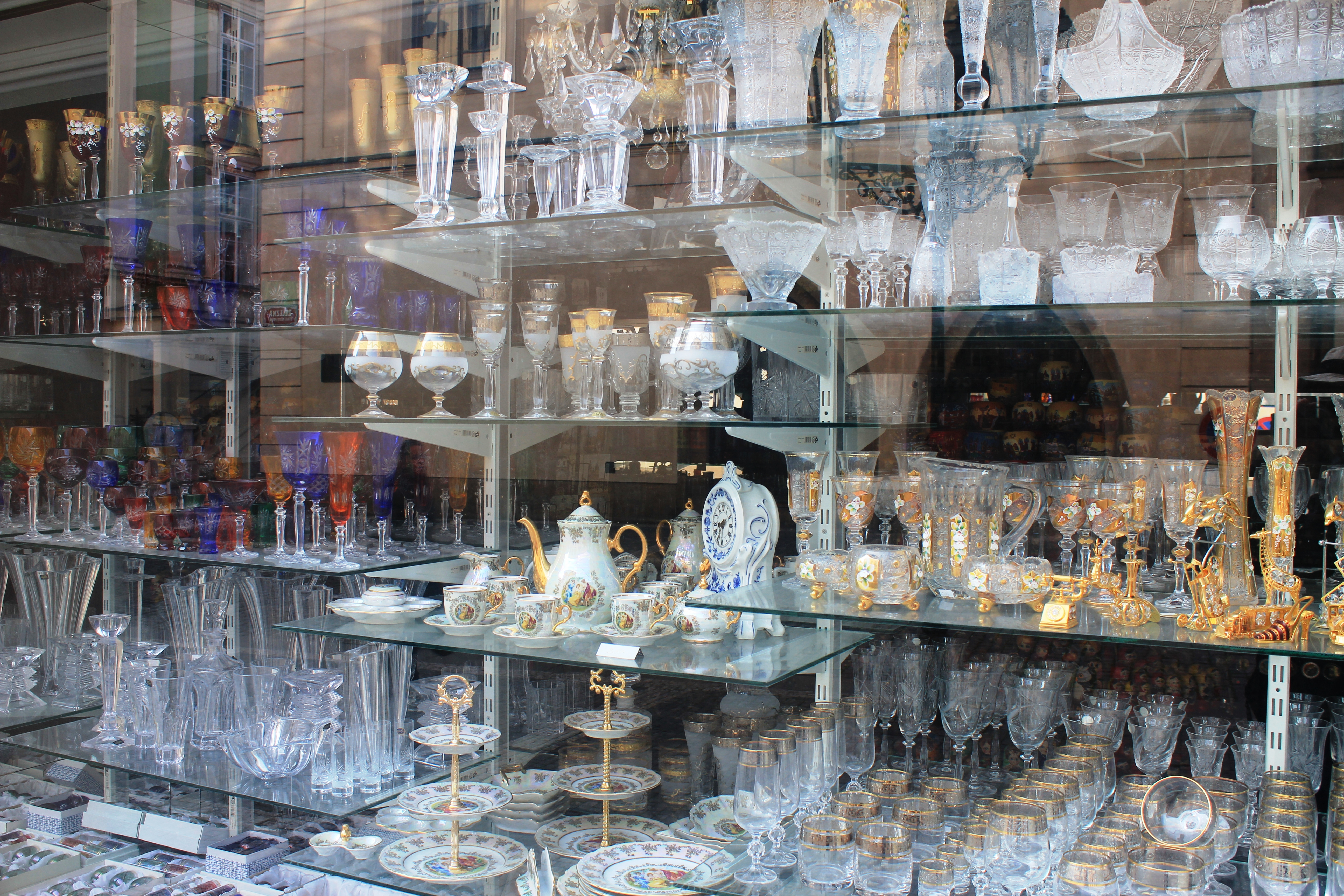 bøhmisk glas bohemian glass